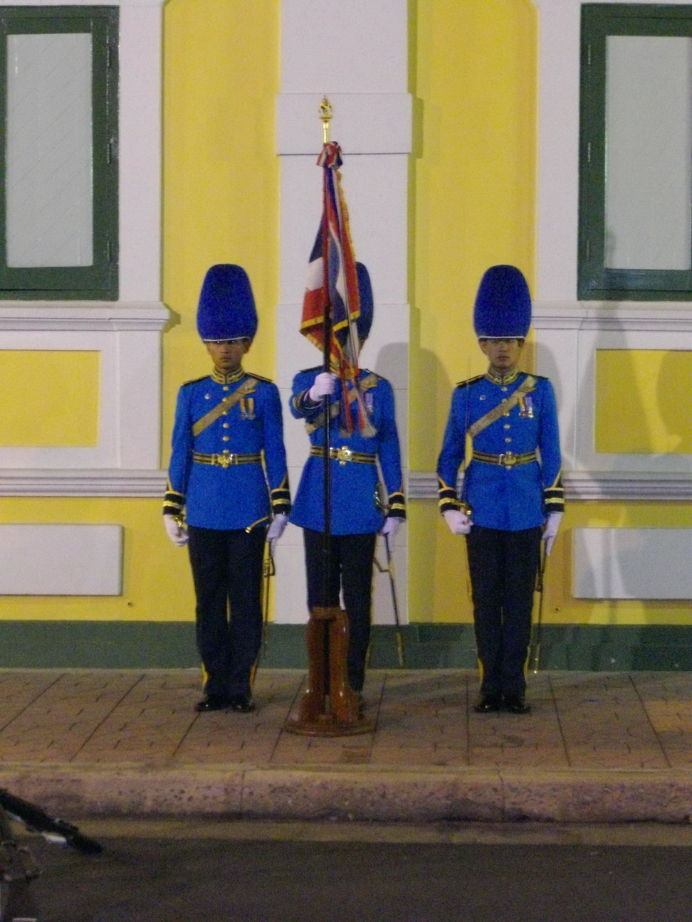 หมู่เชิญธงชัยเฉลิมพลของกองพันนักเรียนนายเรืออากาศรักษาพระองค์ โรงเรียนนายเรืออากาศ ก่อนเข้าริ้วกระบวนเชิญพระศพสมเด็จพระเจ้าพี่นางเธอ เจ้าฟ้ากัลยานิวัฒนา กรมหลวงนราธิวาสราชนครินทร์ วันที่ 15 พฤศจิกายน พ.ศ. 2551 (ถ่ายขณะตั้งแถวทหารที่ถนนกัลยาณไมตรี)